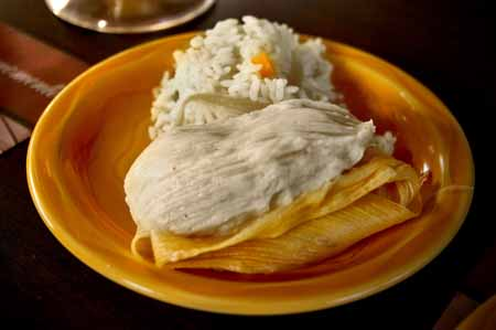 Chuchito, especie de tamal hecho de maíz. Parte de la gastronomía de Guatemala.